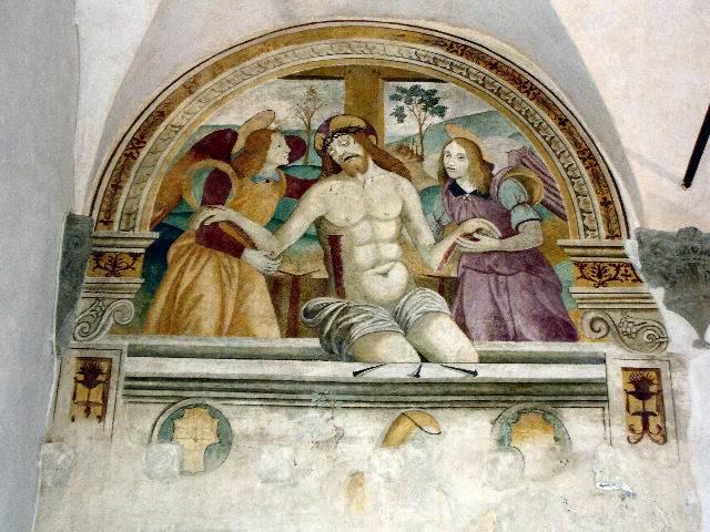 Certaldo, Palazzo Pretorio affresco Cristo morto sorretto da angeli